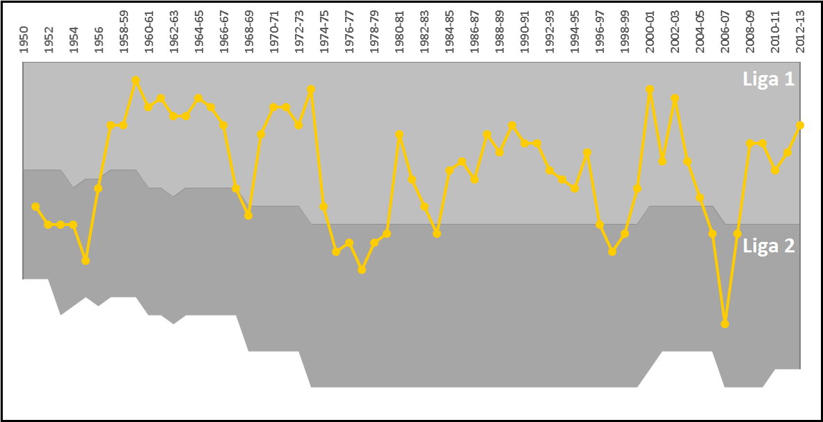 Acest grafic prezintă poziţiile ocupate de FC Braşov în campionatele de fotbal ale României între 1957 şi 2013.